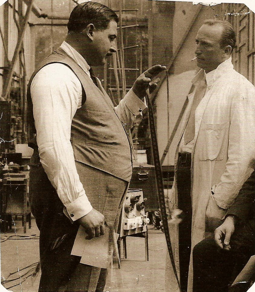 Sascha Kolowrat-Krakowsky at work